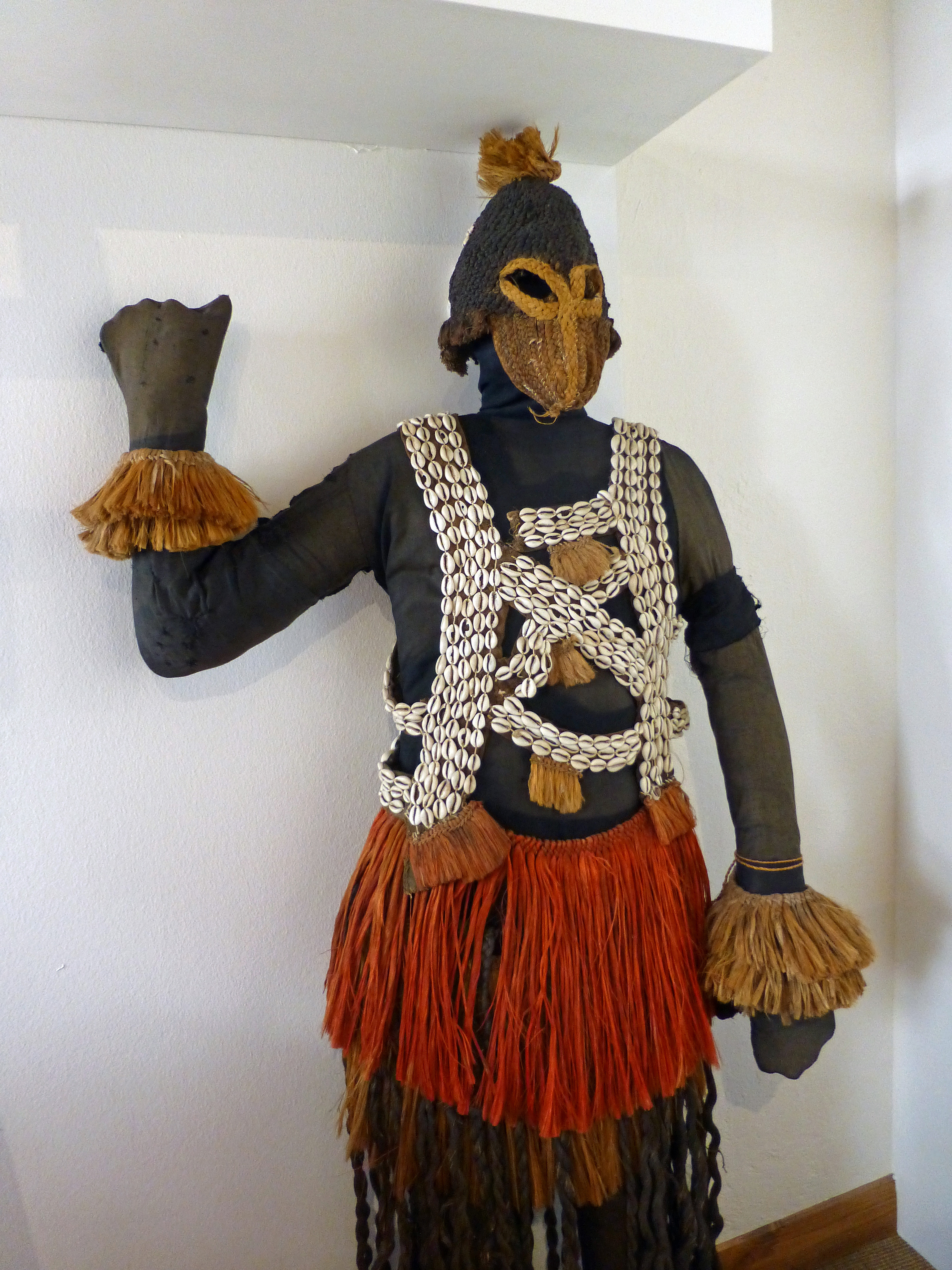 Masque complet Homme Peul, Provenance : Mali (Dogon) Matériaux : végétal : bois, fibres, coton/animal : coquillage (cauris), crin Collections d'objets ethnographiques de l'université de Strasbourg (cf. fiche détaillée dans la base de données Ethno de la Maison interuniversitaire des sciences de l'homme - Alsace) N° d'inventaire : 2002.0.239 Objet présenté dans le cadre d'une exposition temporaire (Passages. Rites initiatiques et funéraires, 2015) au Musée alsacien, par les étudiants de Master2 de Muséologie.